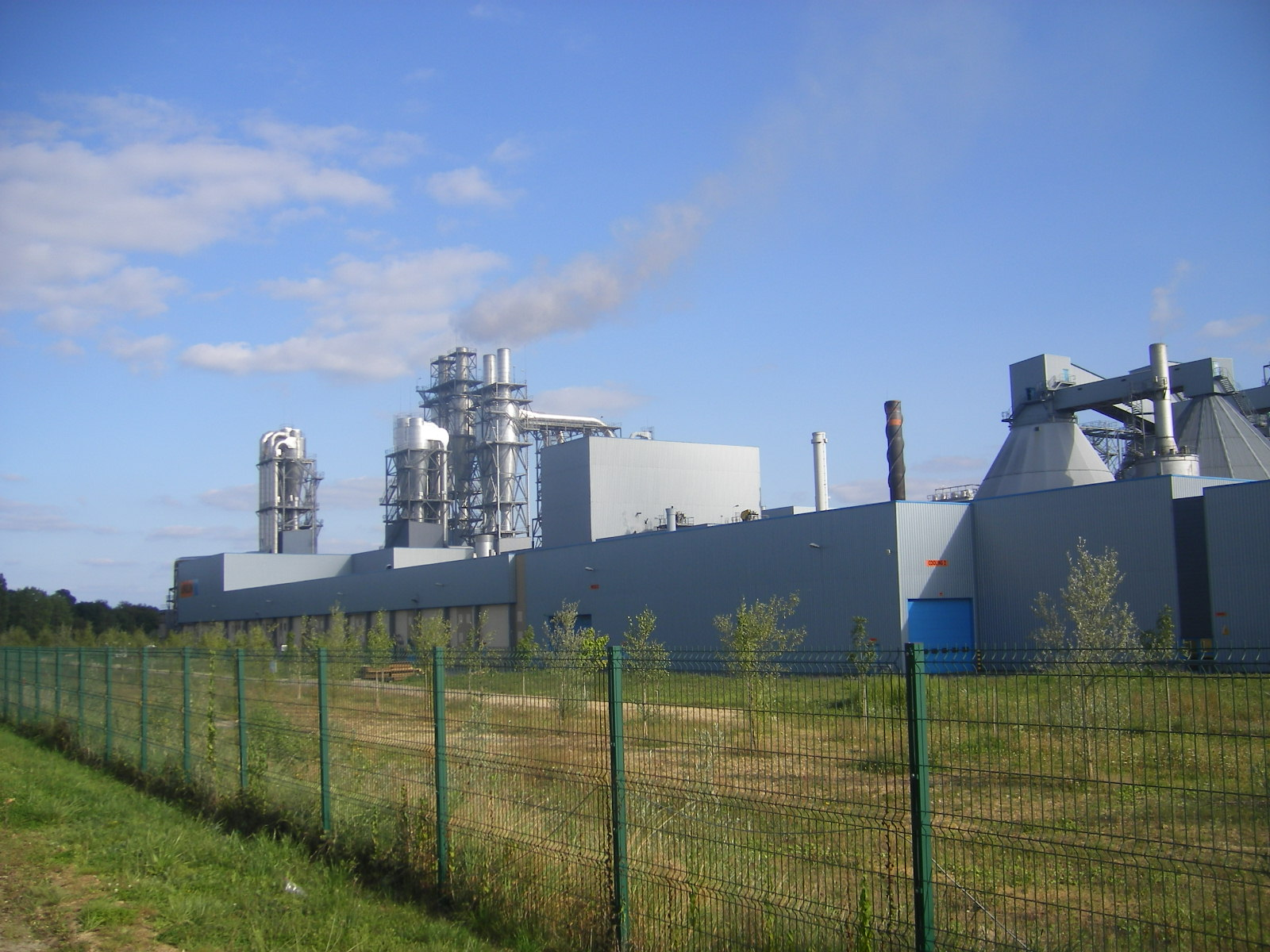 Industrial zone at Bazeilles